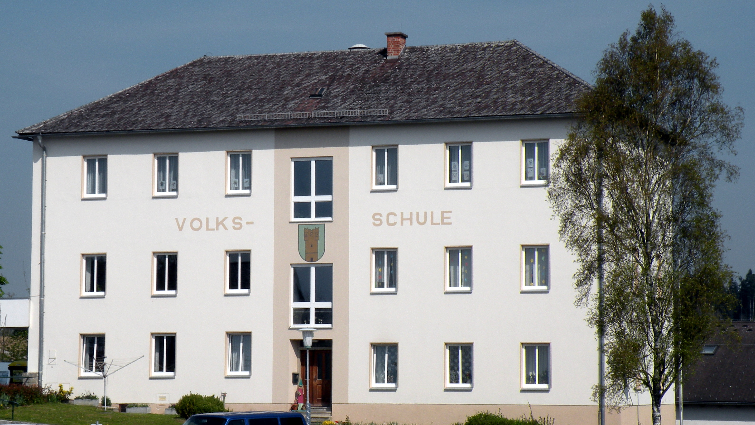 Volksschule Arbing im Bezirk Perg in Oberösterreich